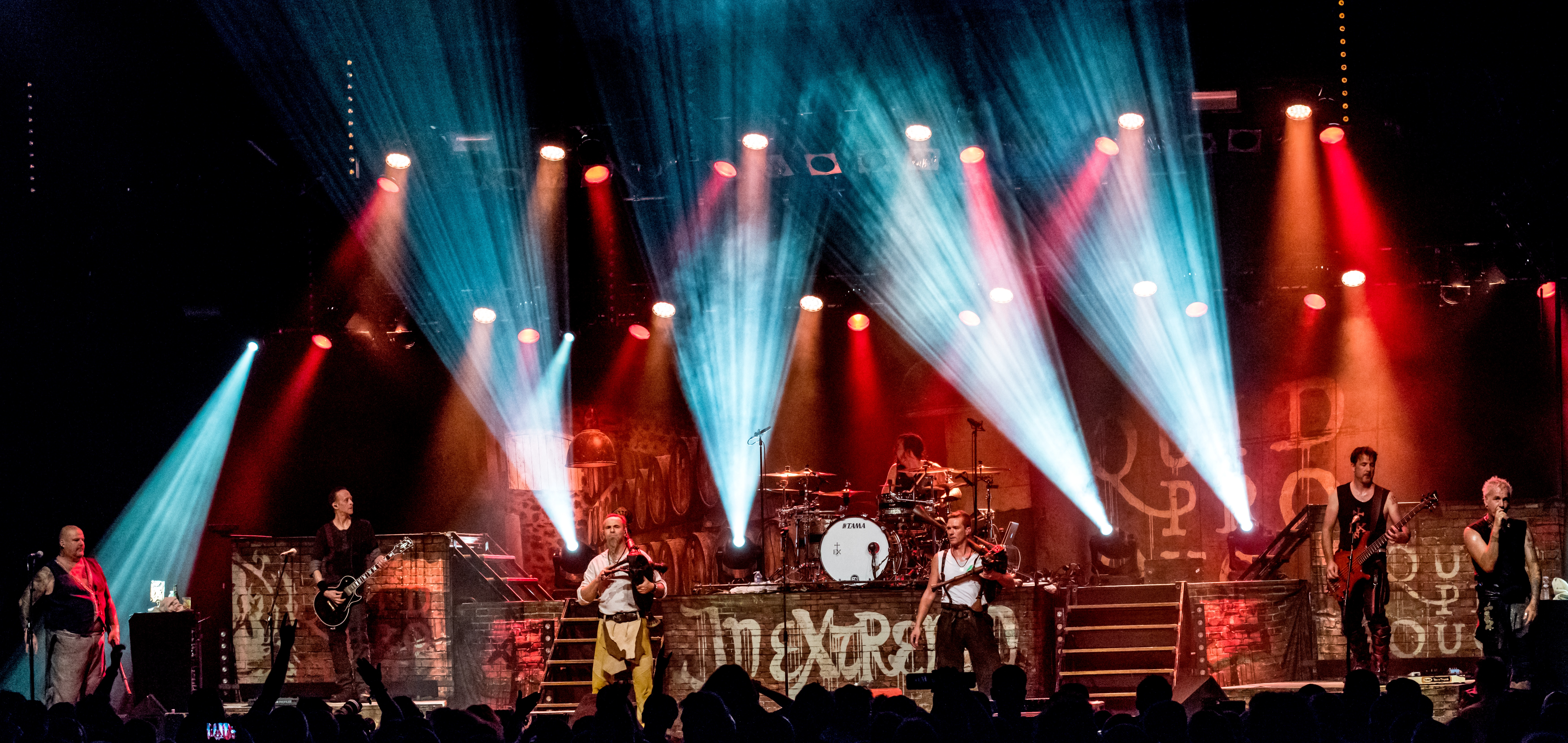 Bilder vom Zelt Musik Festival 2018 in Freiburg im Breisgau In Extremo am 29.07.2018 im Zirkuszelt